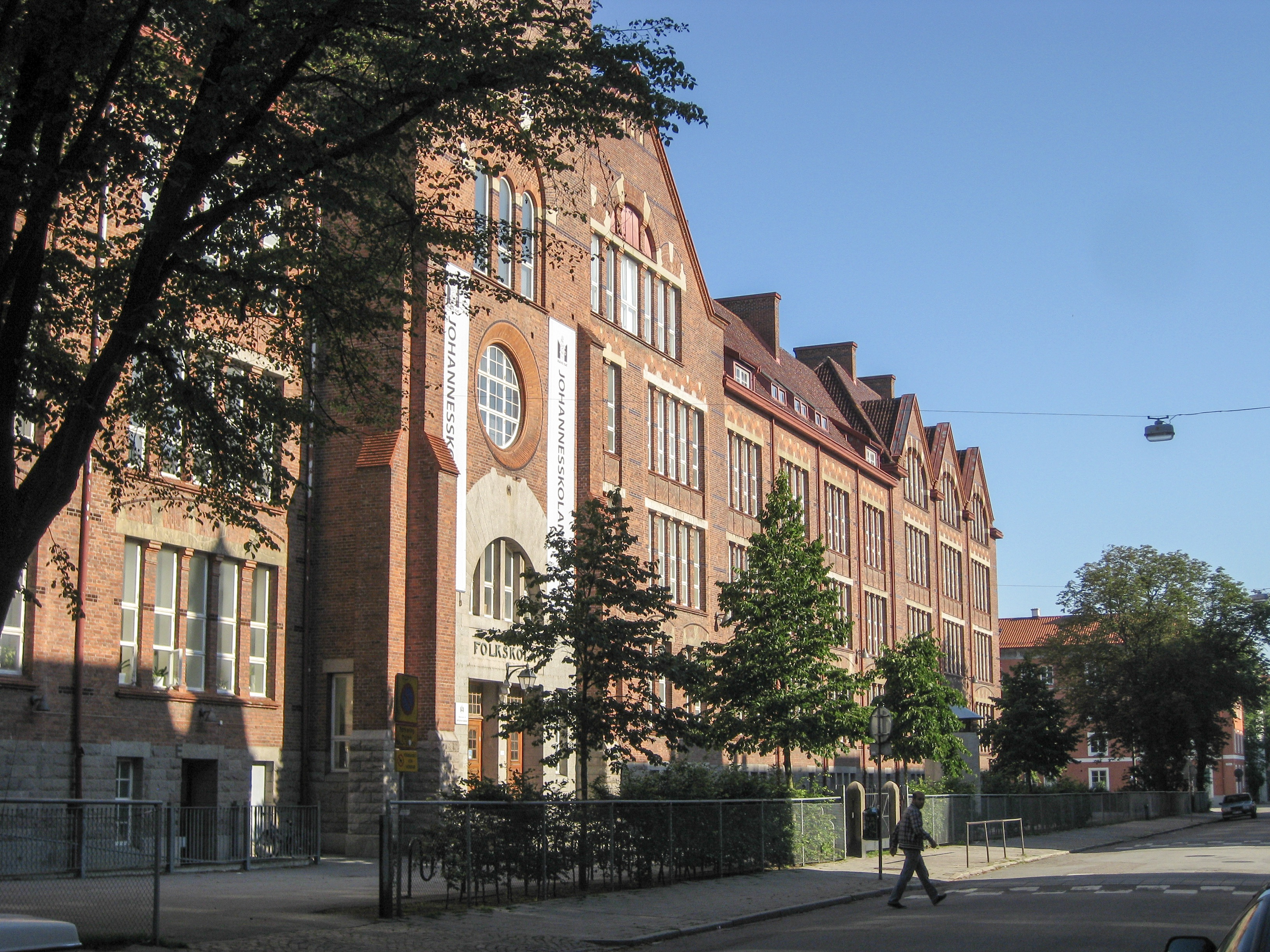 Johannesskolan, Malmö, juli 2011